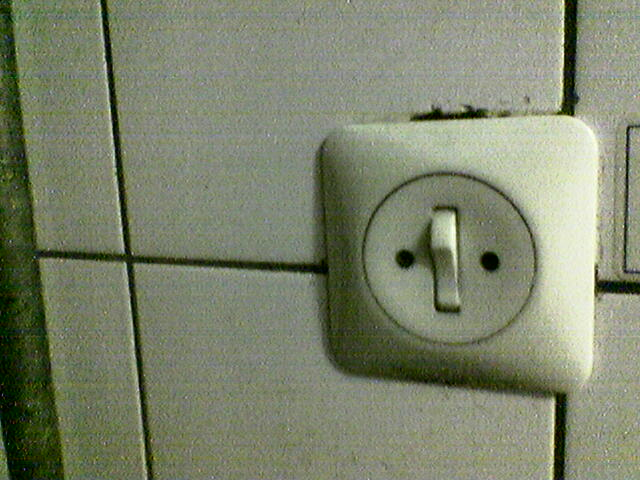 Zelfgemaakte foto